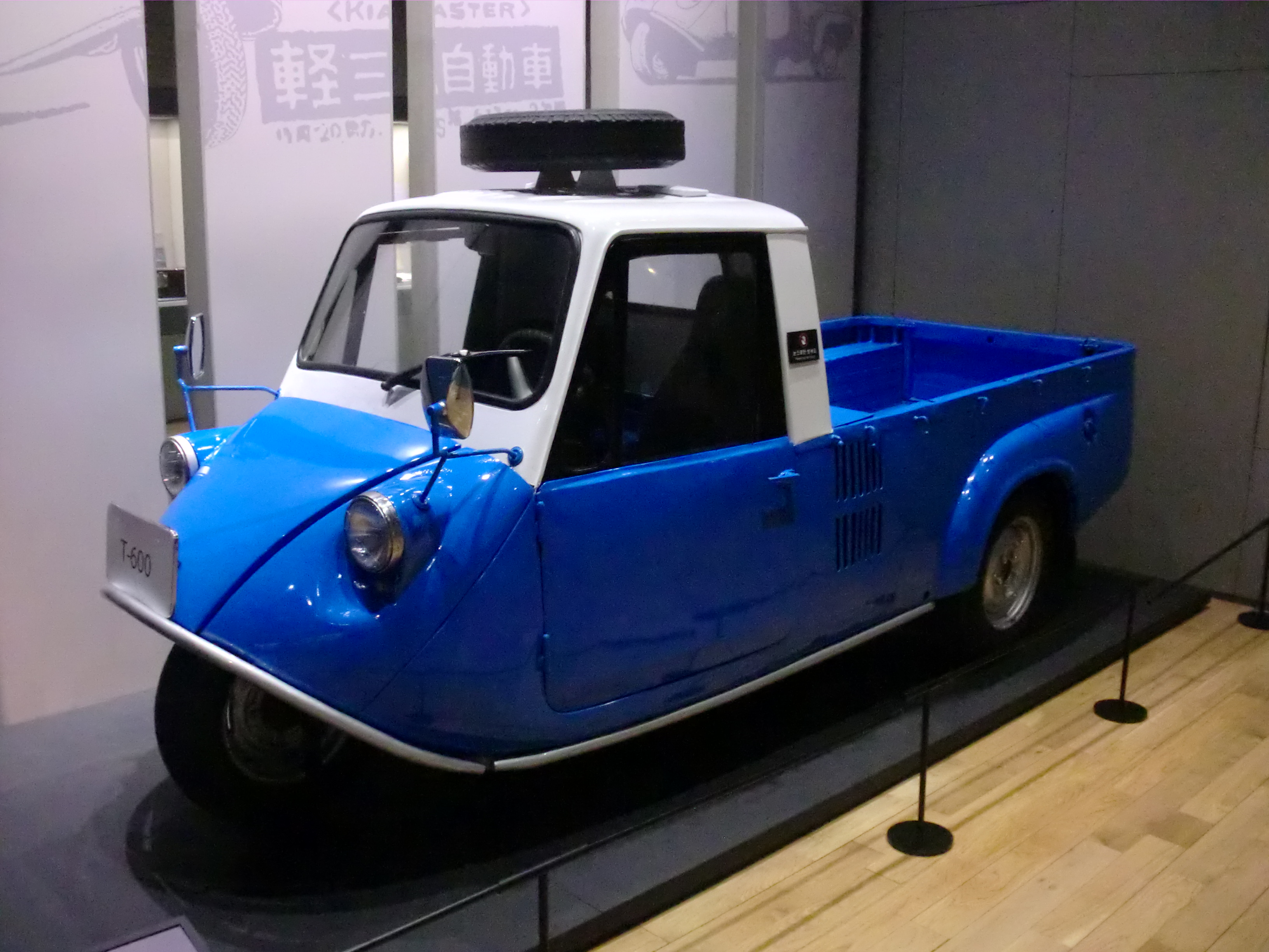 대한민국 역사관에 전시되어 있는 기아 T600